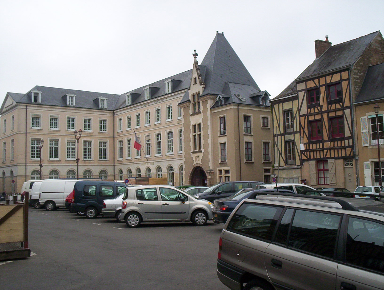 La mairie du Mans en reconstruction Place saint Pierre